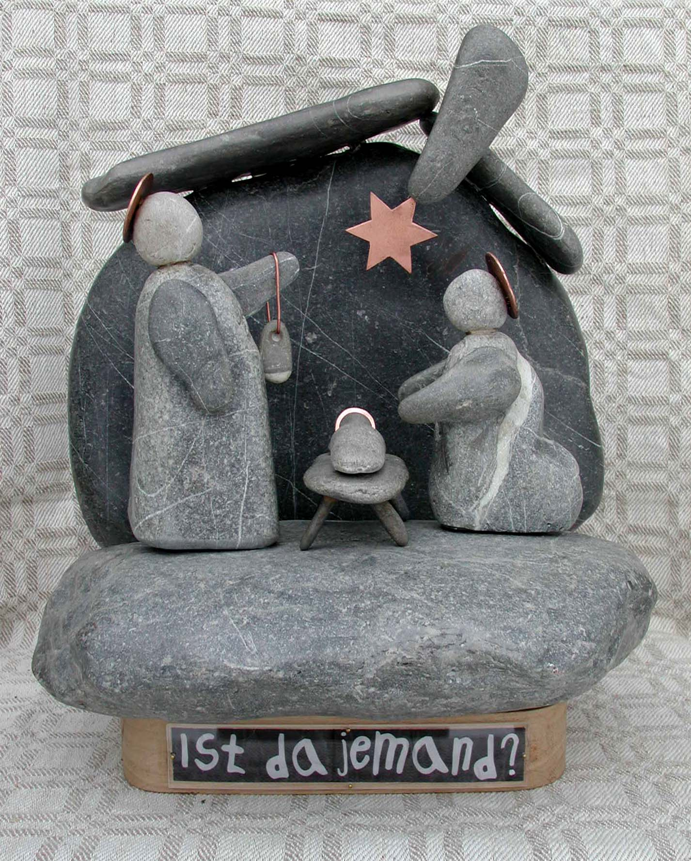 Krippe aus Lechsteinen. Der Schriftzug auf dem Holzsockel stammt aus der ORF Hilfsaktion "Licht ins Dunkel". Die Eigentümer des "Museums Maranatha" haben bei der Übernahme der Krippe für diese Hilfsaktion gespendet.